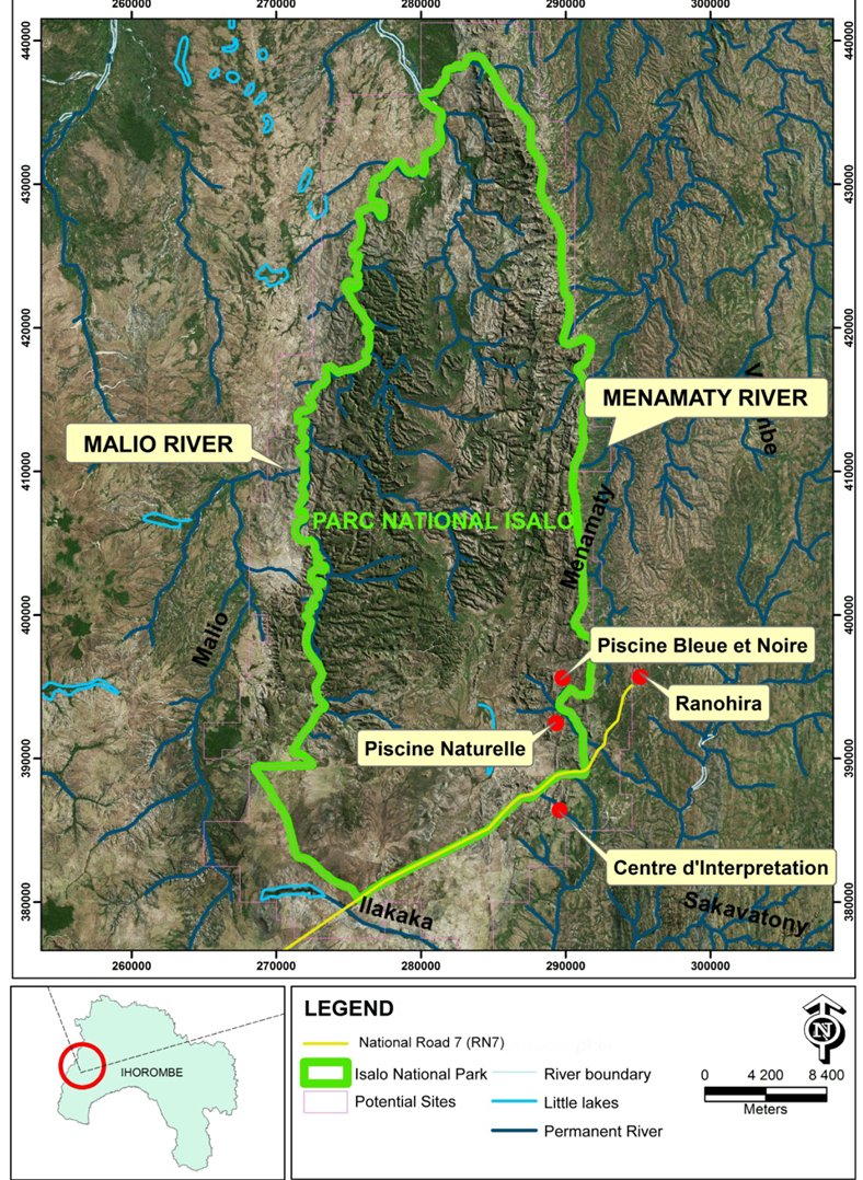 Cette carte accompagne une étude sur la géologie du parc malgache afin d'en évaluer l'intérêt scientifique et touristique.